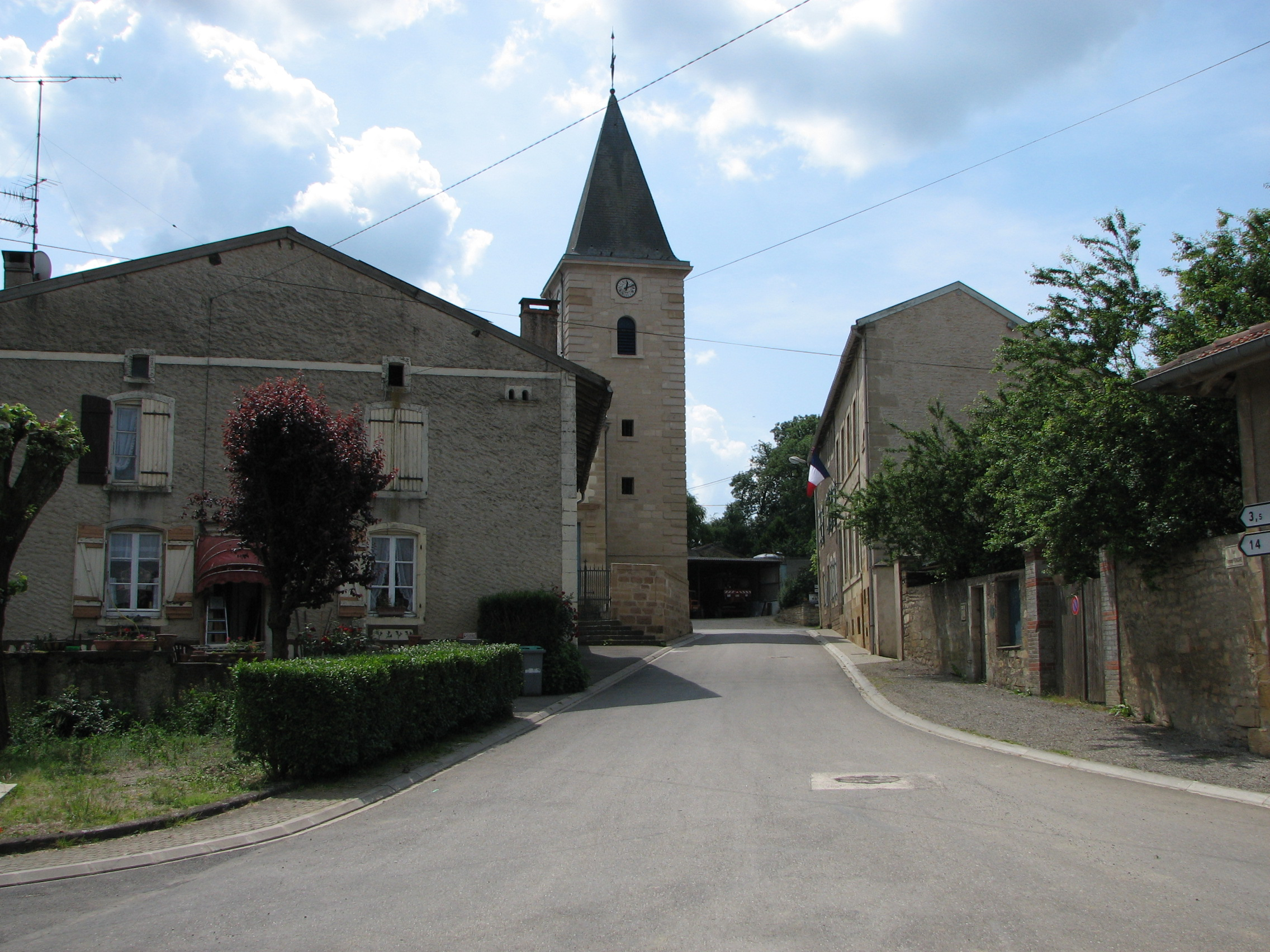 Centre de Muzeray dans la Meuse.